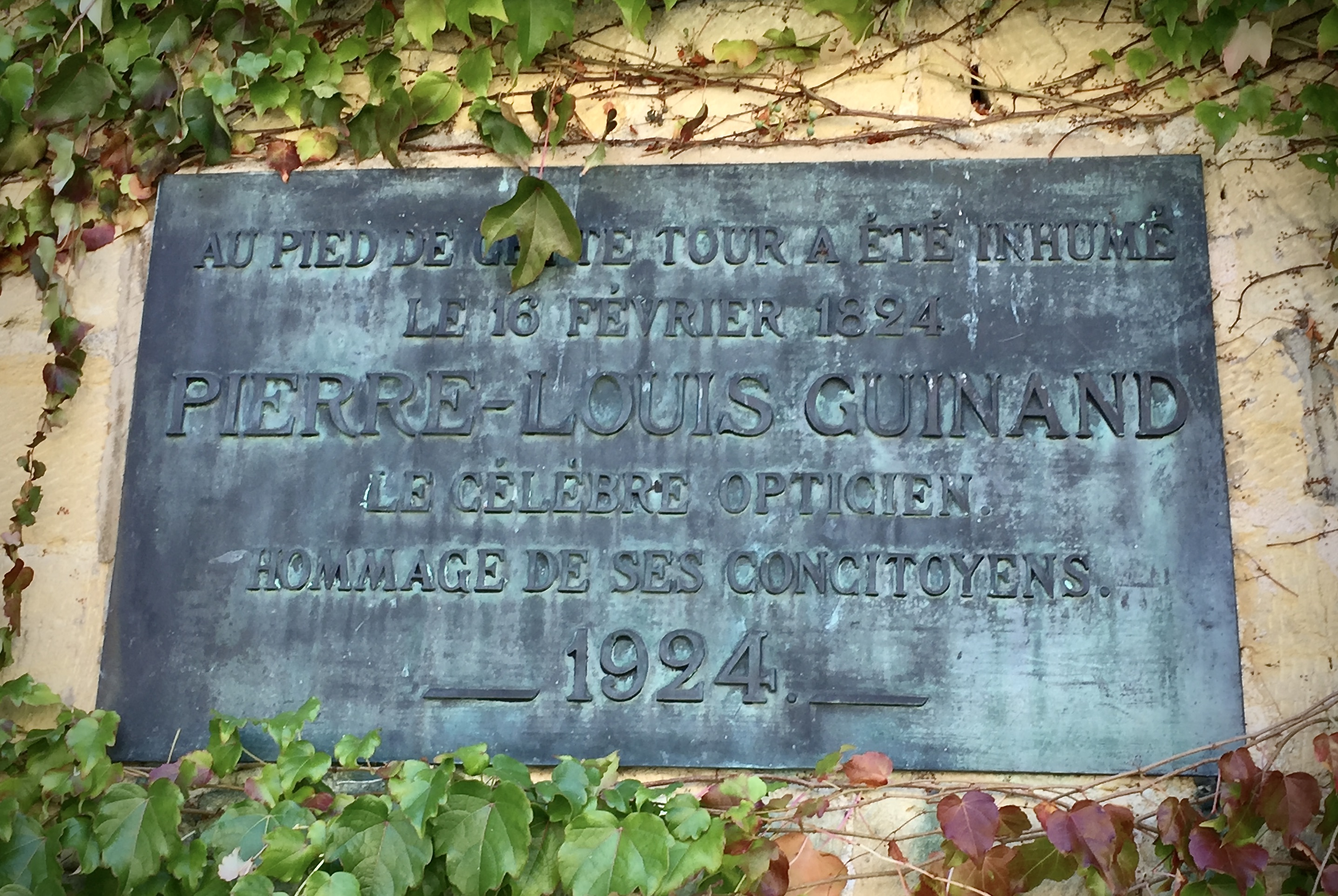 Gedenktafel für den Optiker Pierre-Louis Guinand (1748–1824), der als Erster schlierenfreies optisches Glas herstellte. Am Turm der alten Kirche von Les Brenets (Kanton Neuenburg), heute Sitz der Gemeindeverwaltung. Wortlaut der Inschrift: Au pied de cette tour a été inhumé le 16 février 1824 Pierre-Louis Guinand, le célèbre opticien. Hommage de ses concitoyens. 1924.